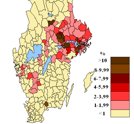 Karta över områden med finsktalande befolkning i procent i södra Sverige, 2005. Originalversion skapad av Mikael Parkvall 2005. Map of areas with Finnish speaking population in southern Sweden, 2005. Original version created by Mikael Parkvall 2005. Data taken from: aménagement linguistique dans le monde.